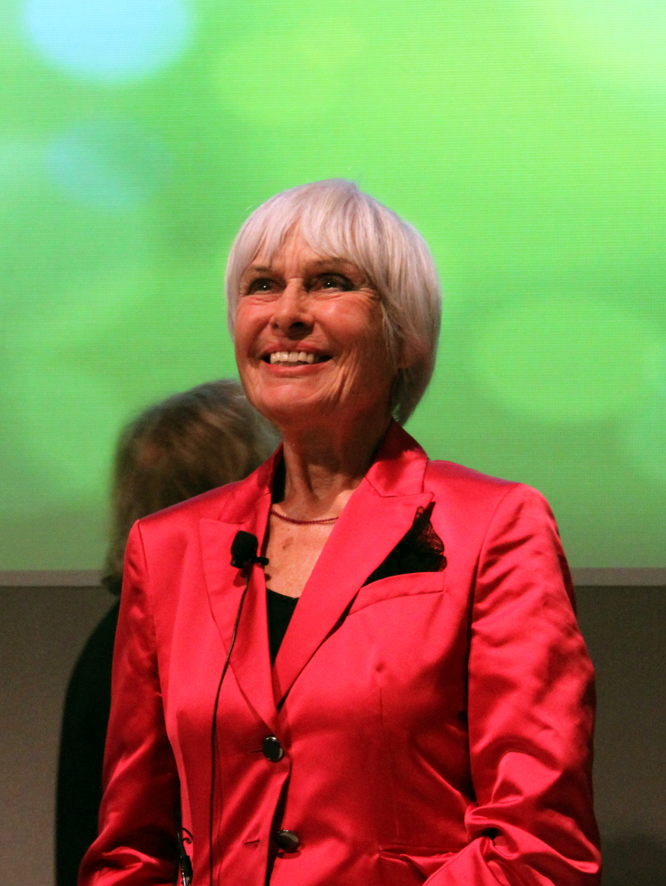 Barbara Rütting bei einem Vortrag auf der Veggie World 2014 in Wiesbaden.